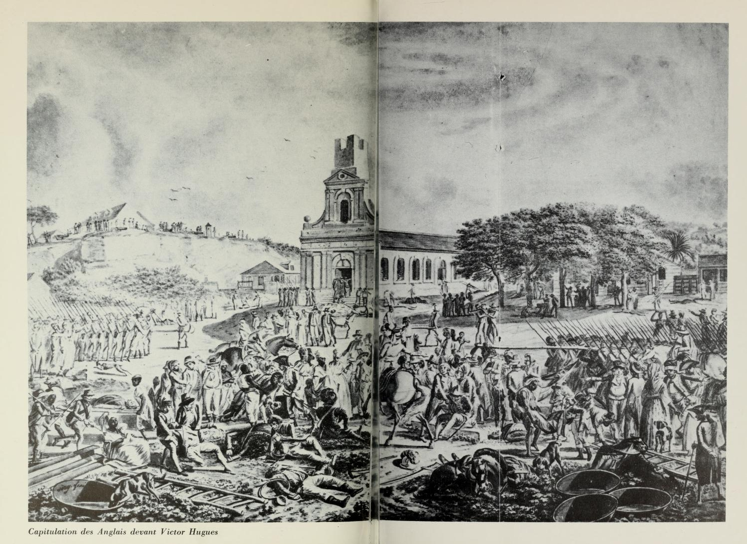 Capitulation des Anglais devant Victor Hugues, 1794, gravure in Auguste Lacour.- Histoire de la Guadeloupe, Basse-terre, 1857. Tome Deuxième, 1789-1798. Réimpression : Edition et Diffusion de la culture antillaise, 1976.